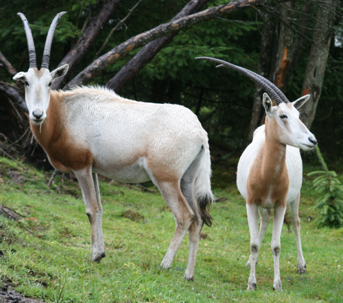 Antiloper - Sabeloryx i Haugaland Zoo